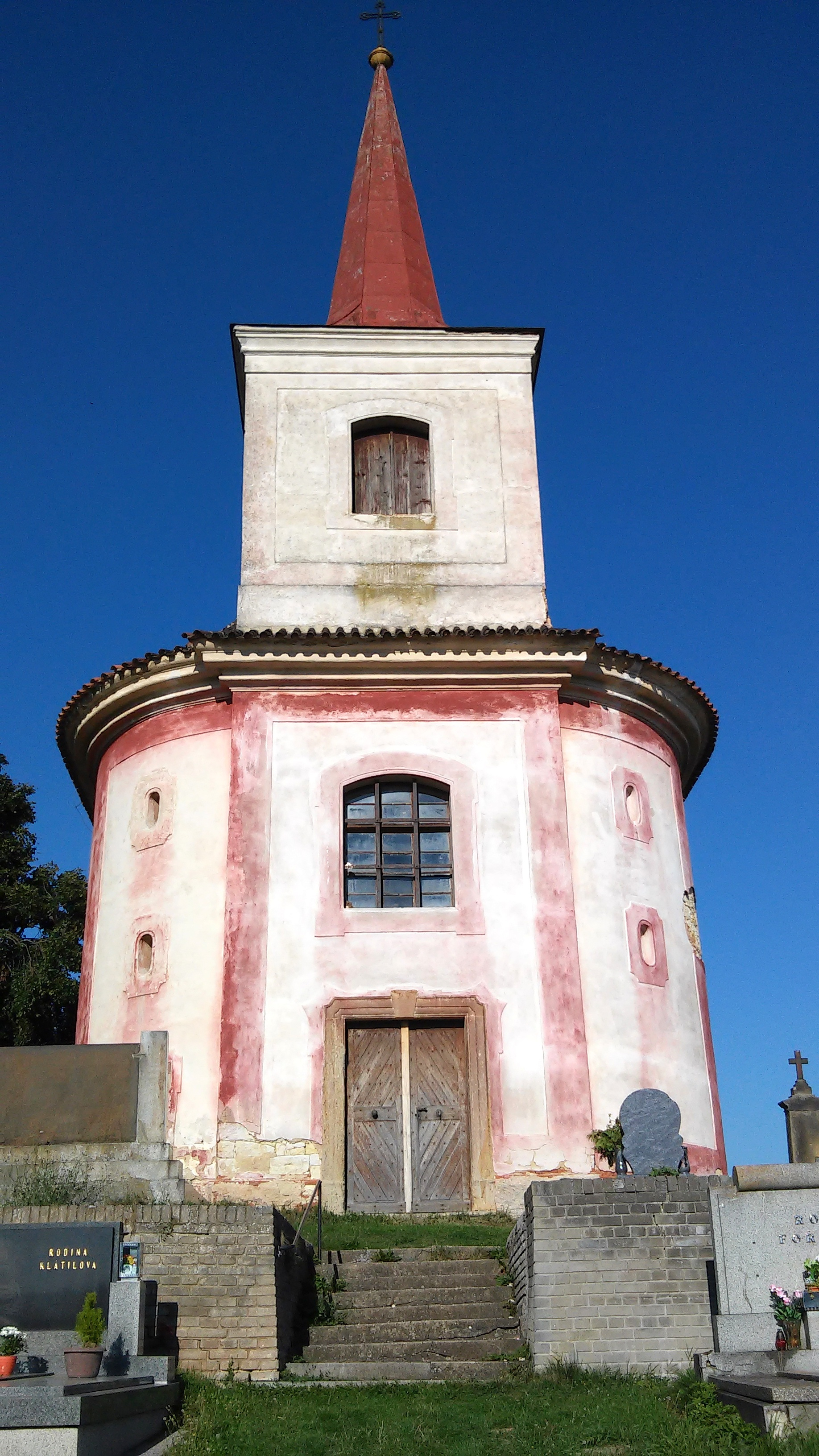 Krupá